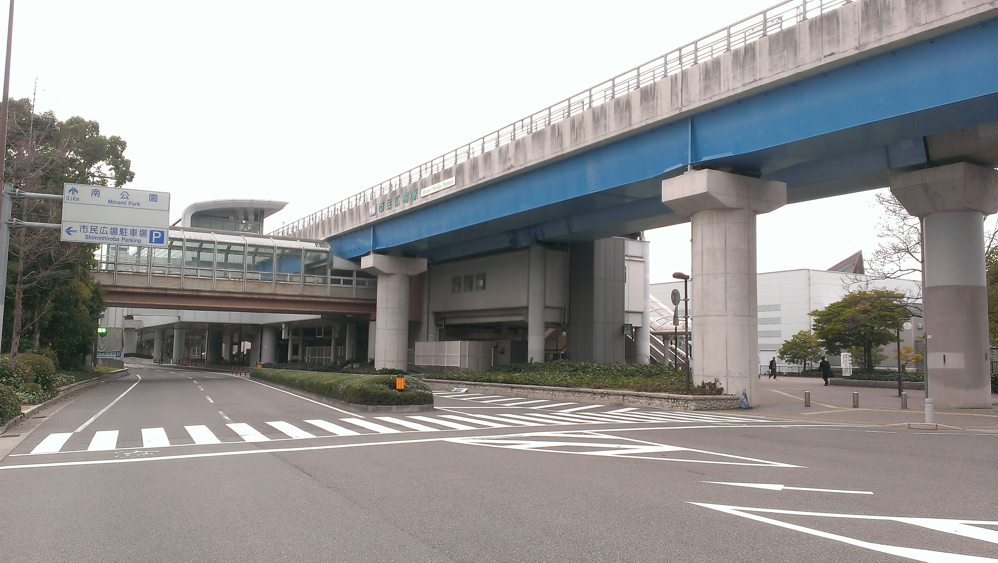 神戸新交通市民広場駅